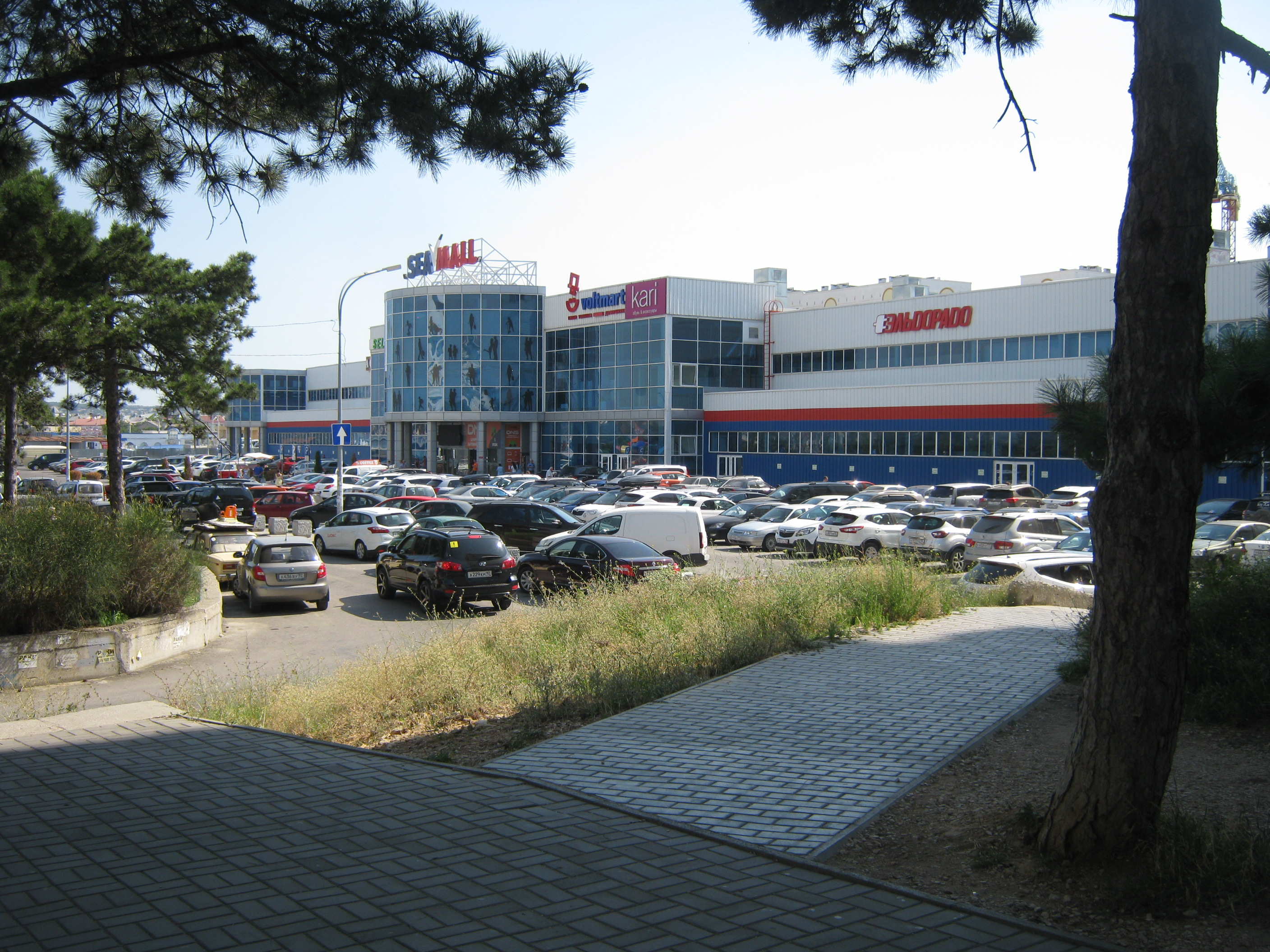 SEA MALL (Севастополь)